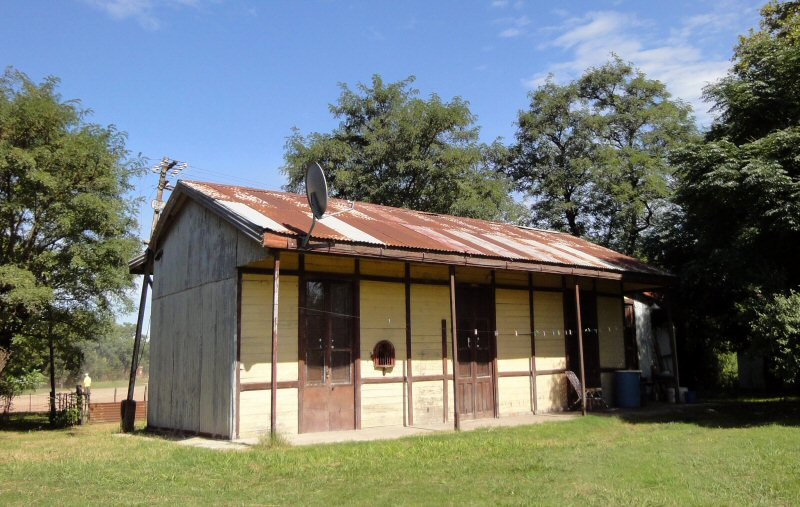 Estación Tomás Jofré del FCGB, ex FFCC CGBA